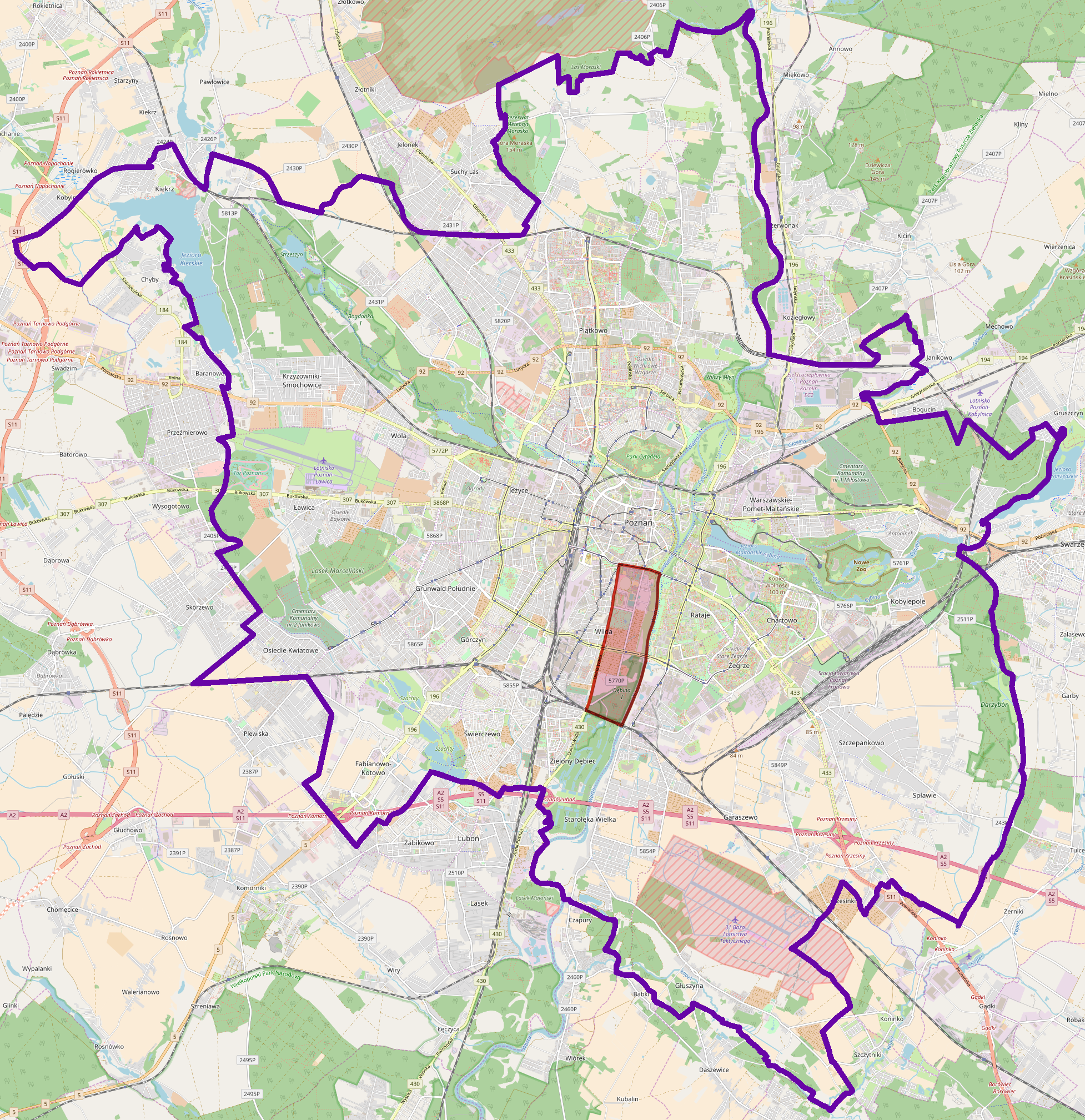 Mapa poznańskiej jednostki obszarowej Łęgi Dębińskie. Przebieg granic na podstawie mapy jednostek obszarowych Systemu Informacji Miejskiej.